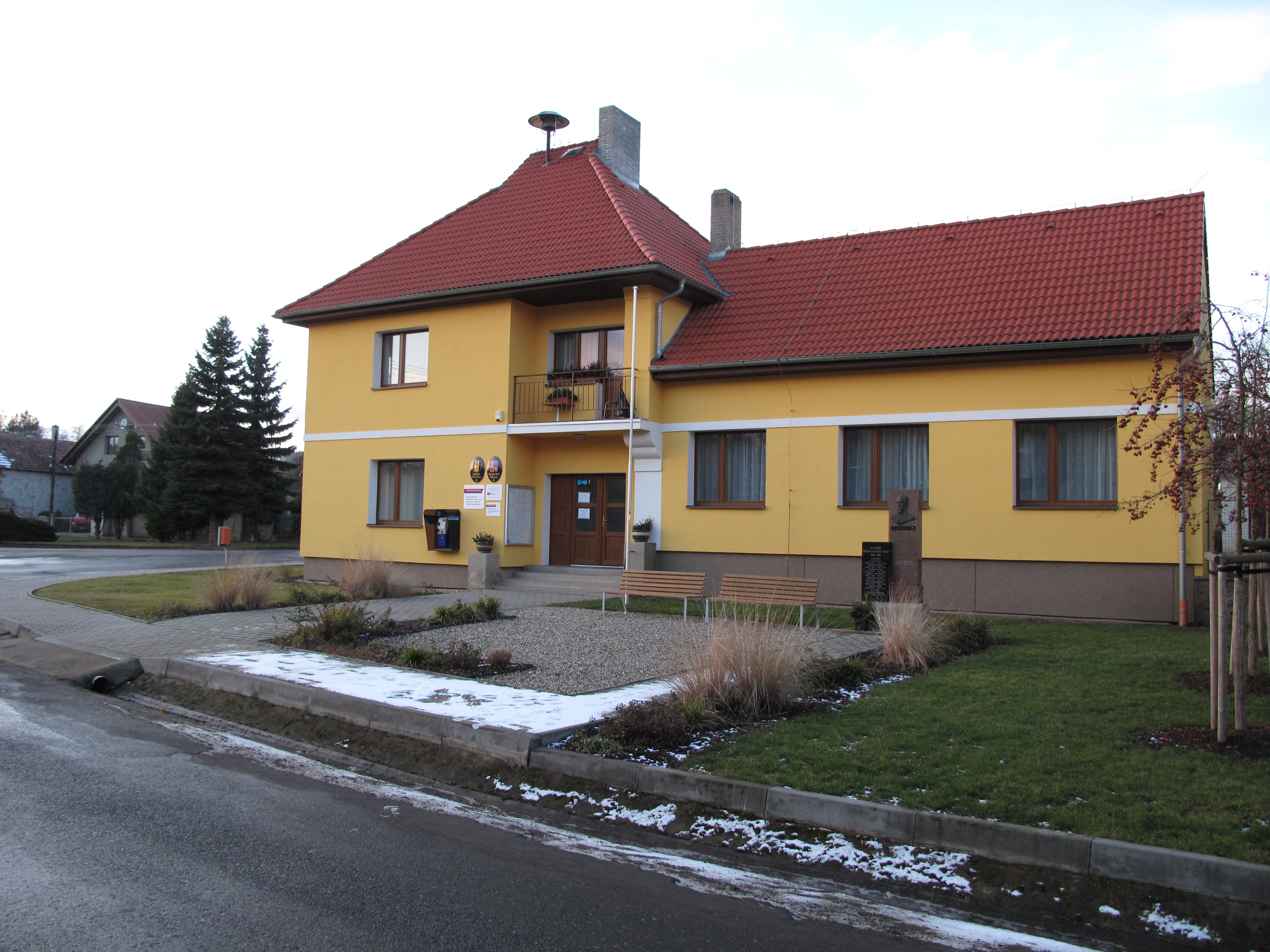 Obecní úřad v Plchově. Okres Kladno, Česká republika.